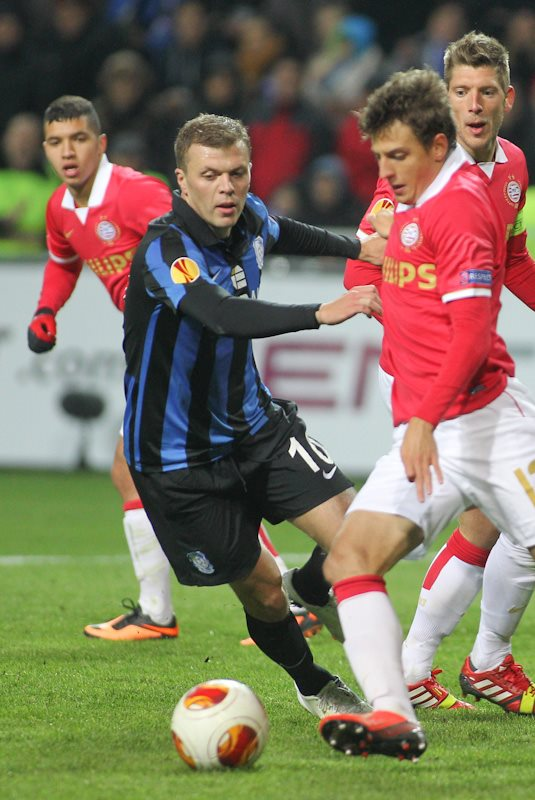 Олексій Гай - український футболіст